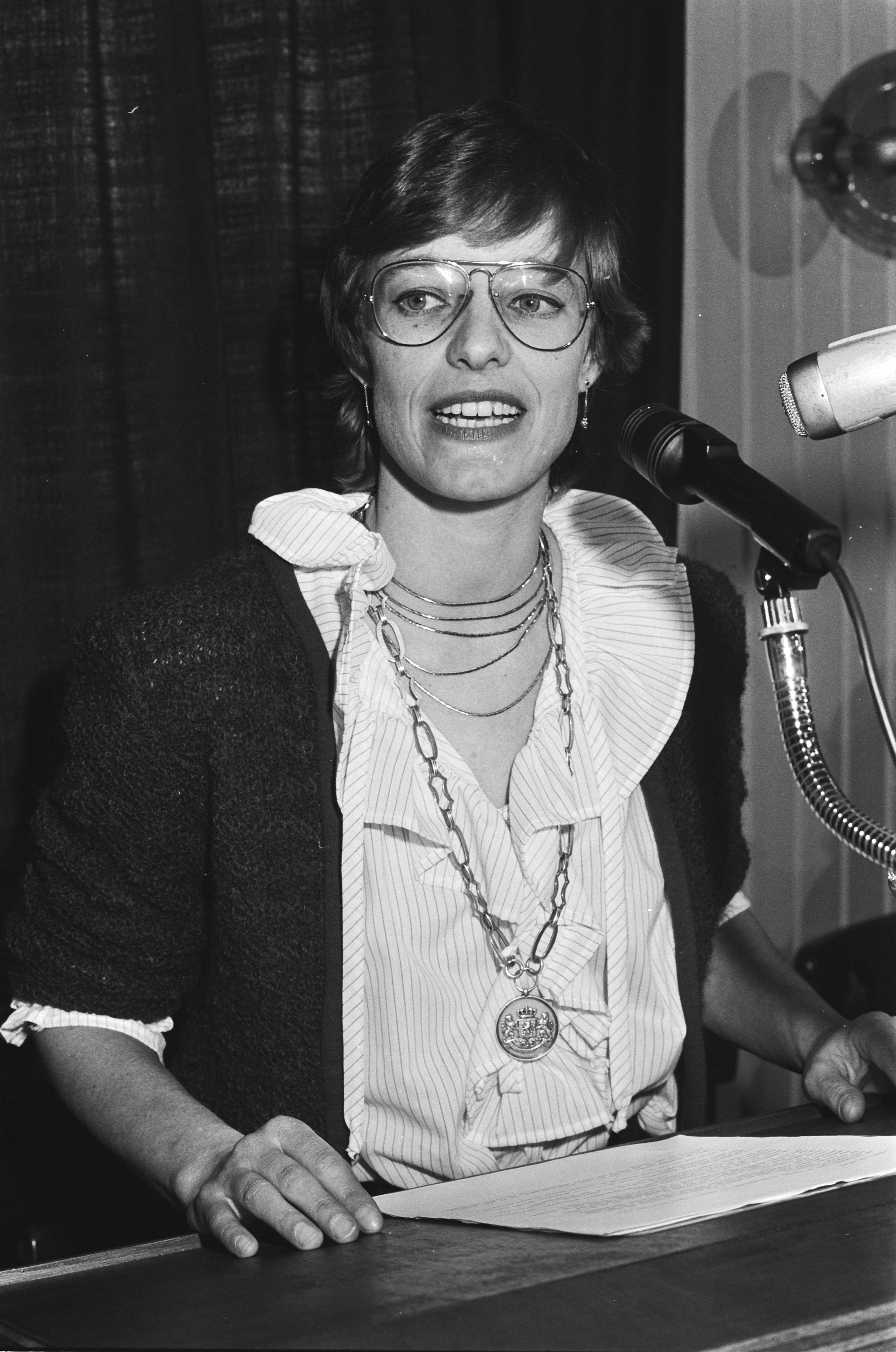 Collectie / Archief : Fotocollectie Anefo Reportage / Serie : Eerste communistische burgemeester in Nederland Beschrijving : Mevrouw H. Jagersma wordt als eerste communistische burgemeester in Nederland in Beerta geïnstalleerd Datum : 1 april 1982 Locatie : Beerta, Groningen Trefwoorden : ambtsketens, burgemeesters, installaties Persoonsnaam : Jagersma Fotograaf : Dijk, Hans van / Anefo Auteursrechthebbende : Nationaal Archief Materiaalsoort : Negatief (zwart/wit) Nummer archiefinventaris : bekijk toegang 2.24.01.05 Bestanddeelnummer : 932-0836